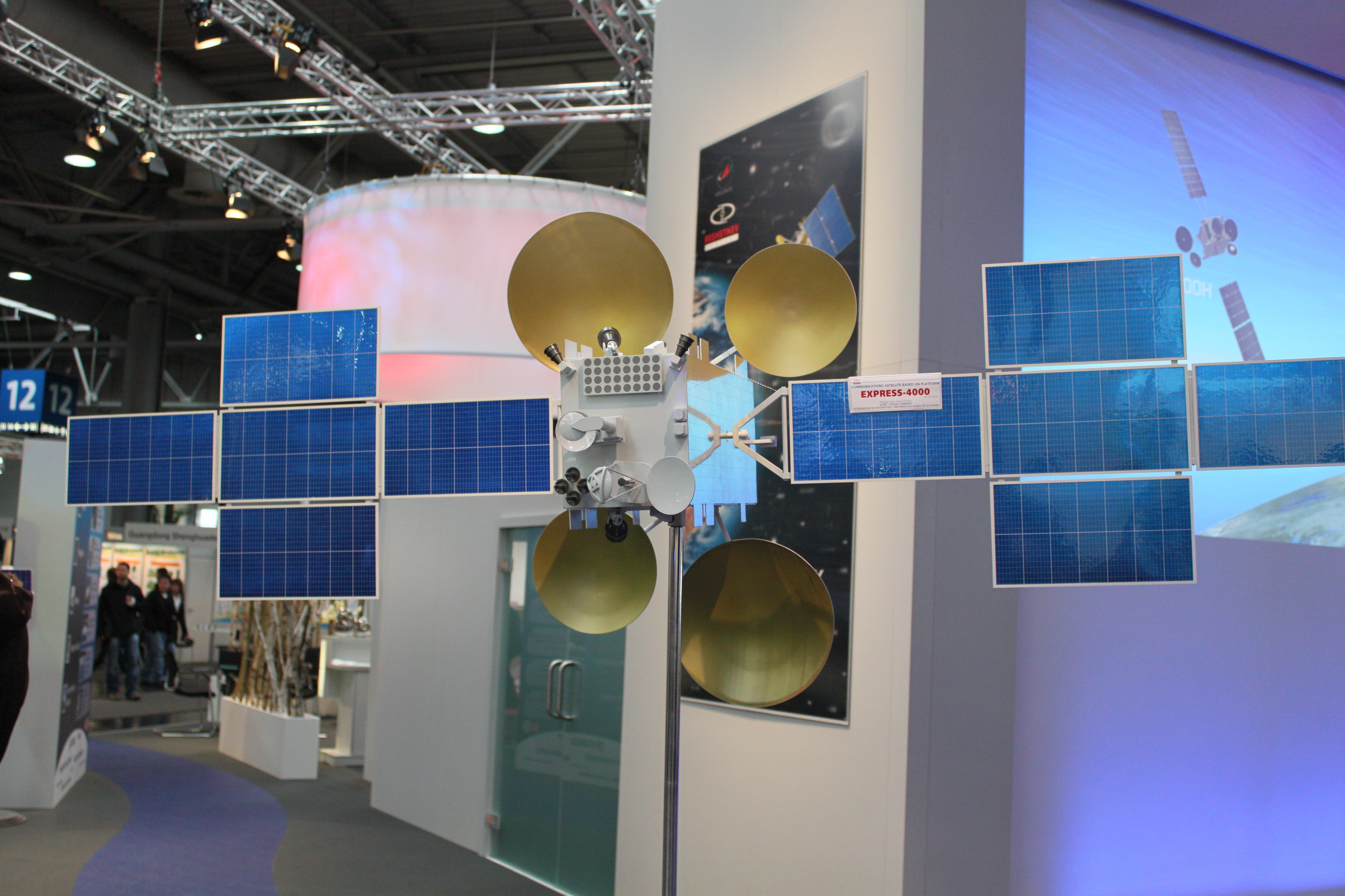 CeBIT 2011